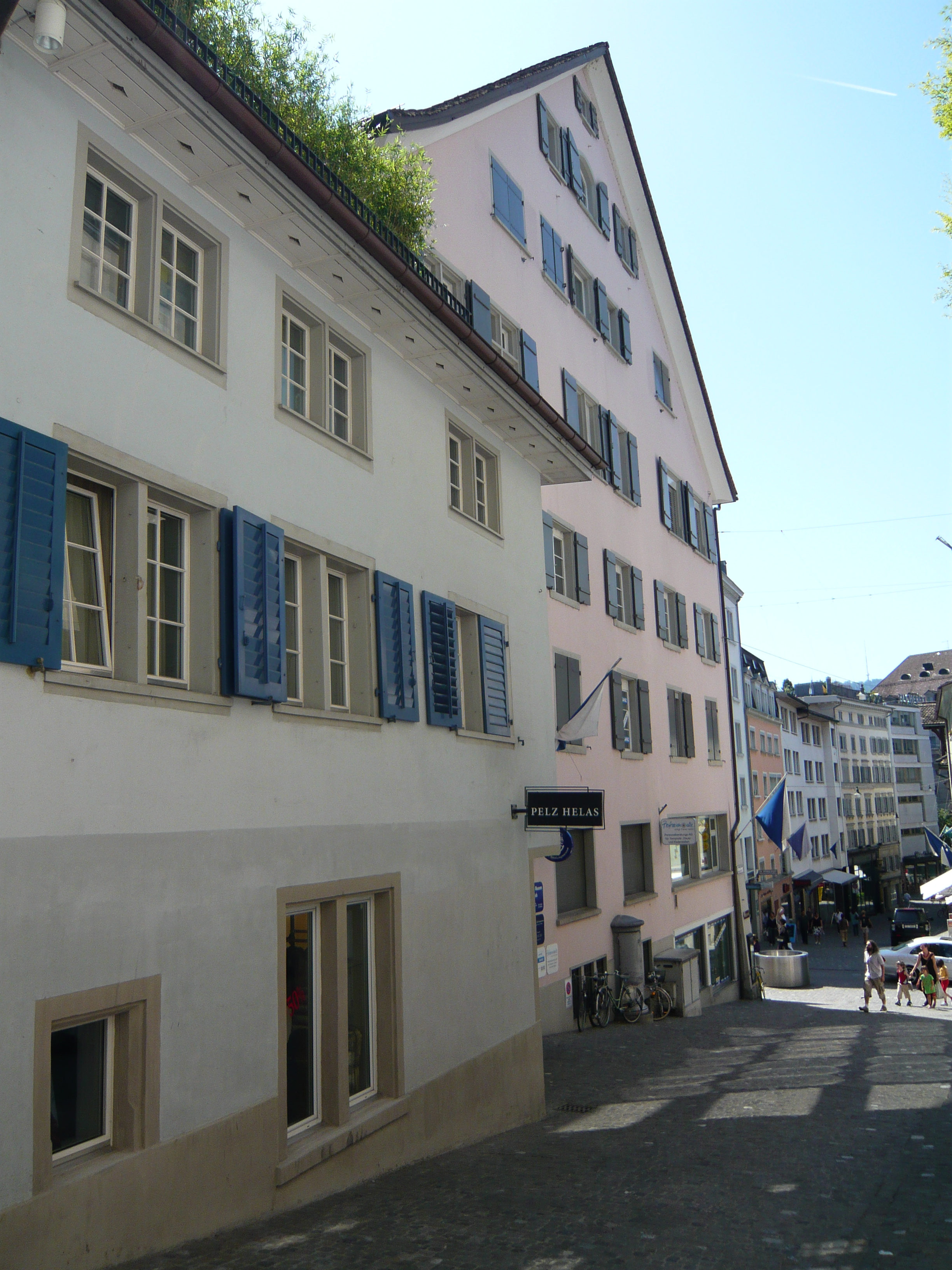 aufgenommen am Zürcher Spielzeugmuseum